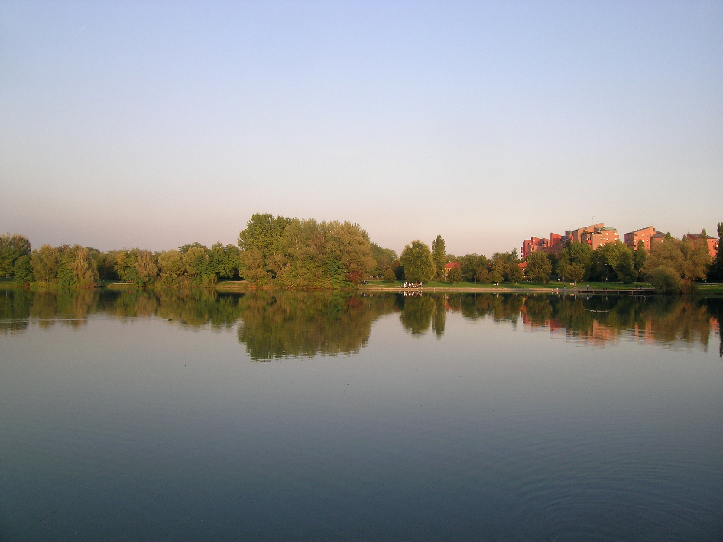 Tramonto alla cava nella parte a sud del Parco delle Cave di Milano.